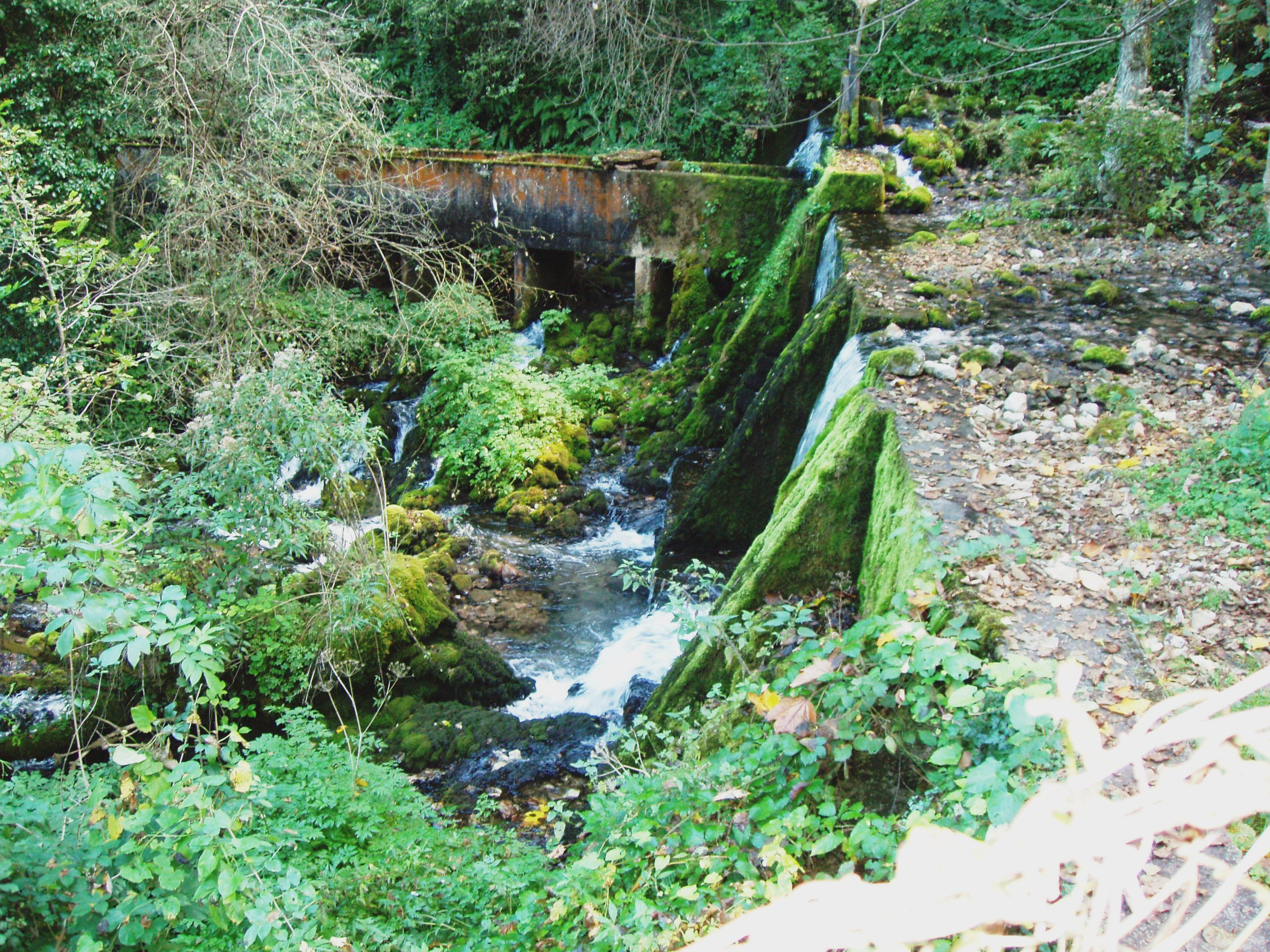 The Confluence of the Vrelo river into the Drina river - Perućac - Уливање речице Врело у Дрину - Перућац